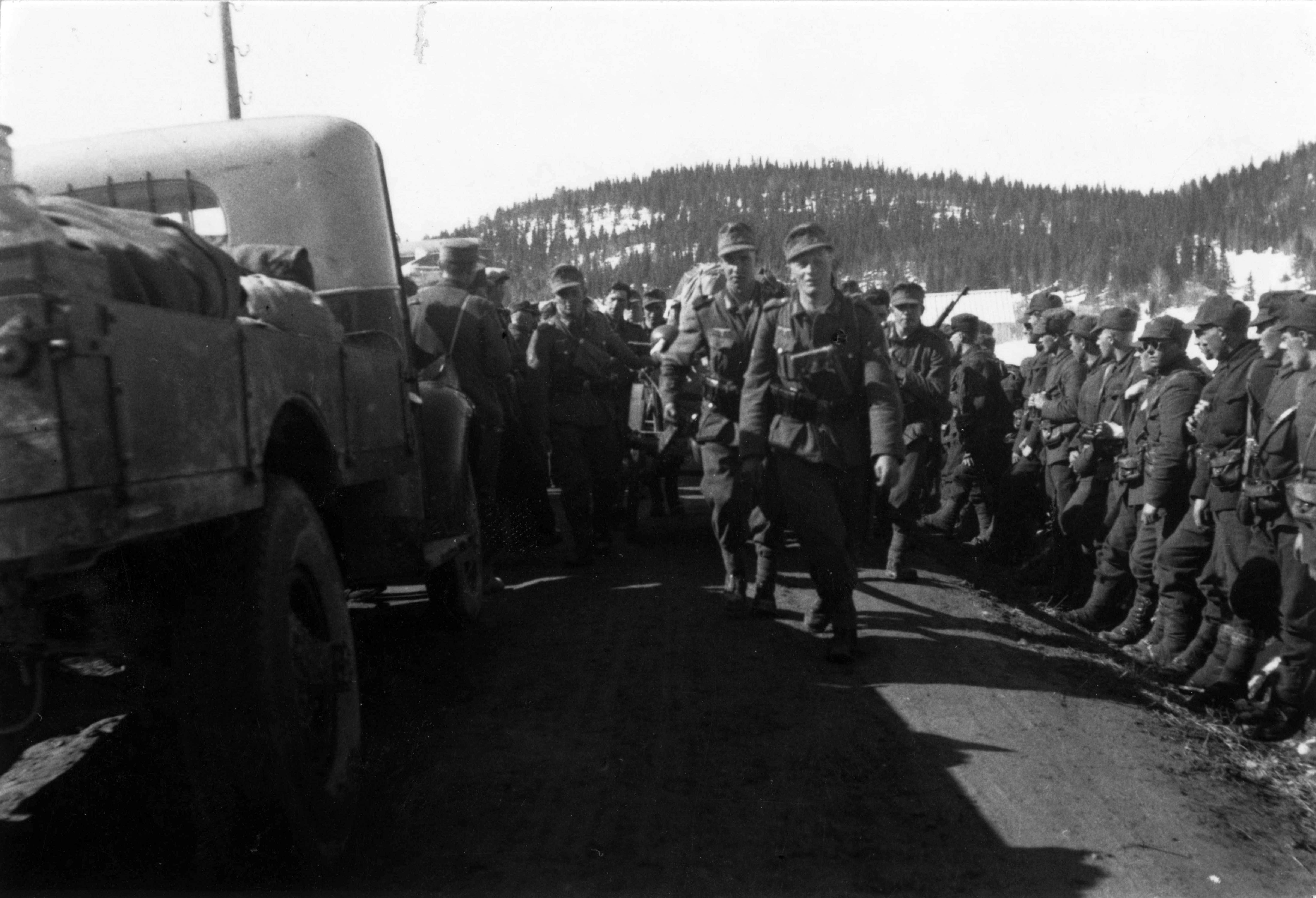 Ved Kvam, sto norske soldater som nettopp hadde kapitulert Tittel / Title: Ved Kvam 4. mai 1940 Norske kapitulerte soldater i veigrøftene. Disse var beordret av sine offiserer til å gå ut i veigrøftene for å la fienden passere fritt. Dato / Date: 04.05.1940 Fotograf / Photographer: Rudi Margreiter Sted / Place: Kvam Eier / Owner Institution: Arkiv i Nordland Lenke / Link: Arkiv i Nordland Arkivreferanse /Archive reference: AIN.NA143.0093 Fra Dag Skogheims Privatarkiv Tekst bak på bildet: Aus meiner fotosammlung: anfang mai 1940, blick nach süden bei Grong, wo zum glück oberst Getzen kampf einstellte, so konnten junge leute beider seiten noch weiterleben!